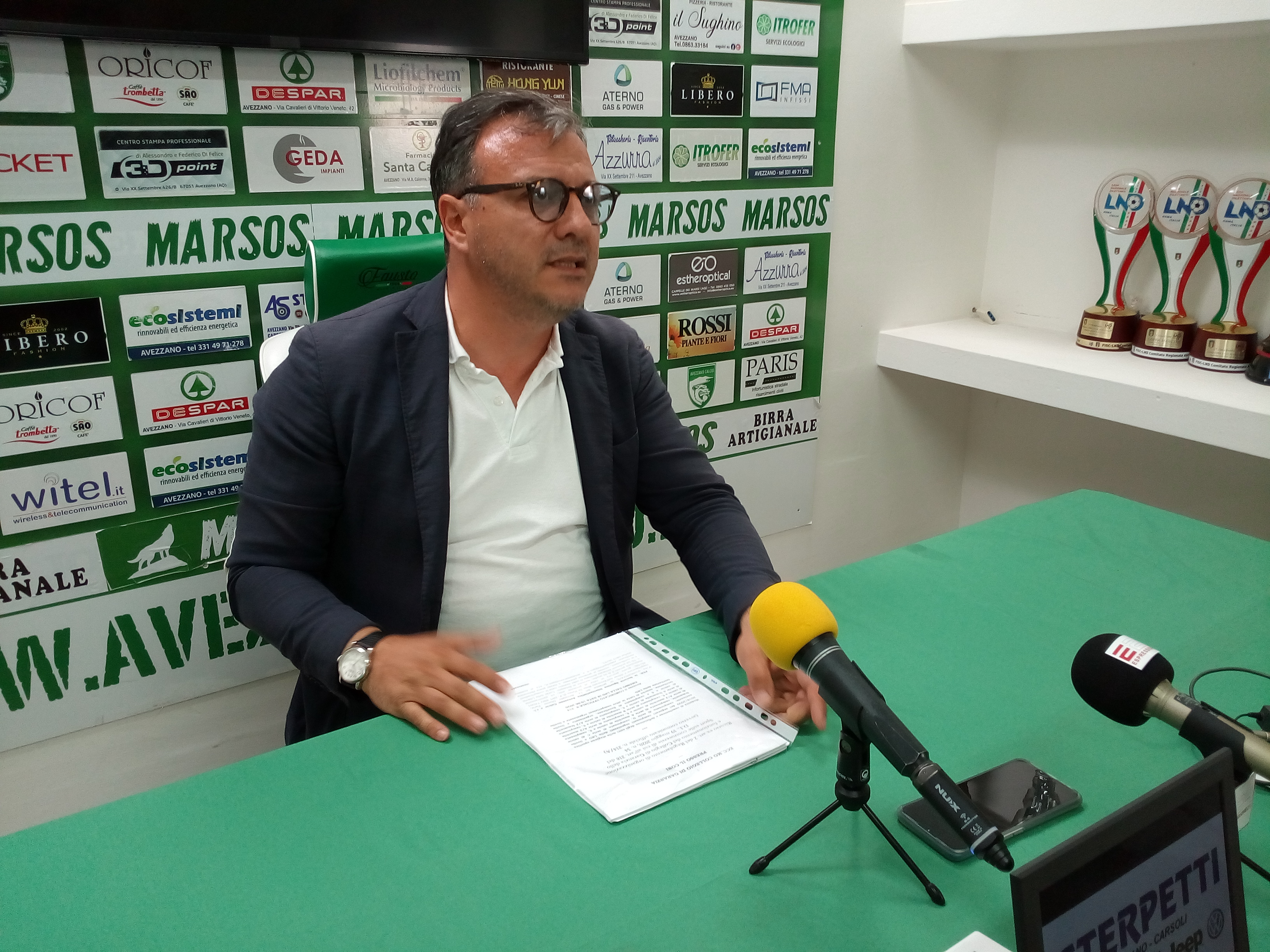 Gianni Paris, presidente dell'Avezzano Calcio